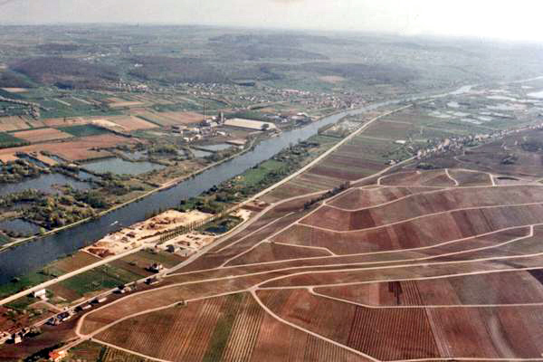 Wëngerte bei Wellesteen Vue op de Goldbierg an de Gaalgebierg 1991 nom Remembrement Source: Fotograf: Utilisateur:Beideler René, color changes by User:Cornischong